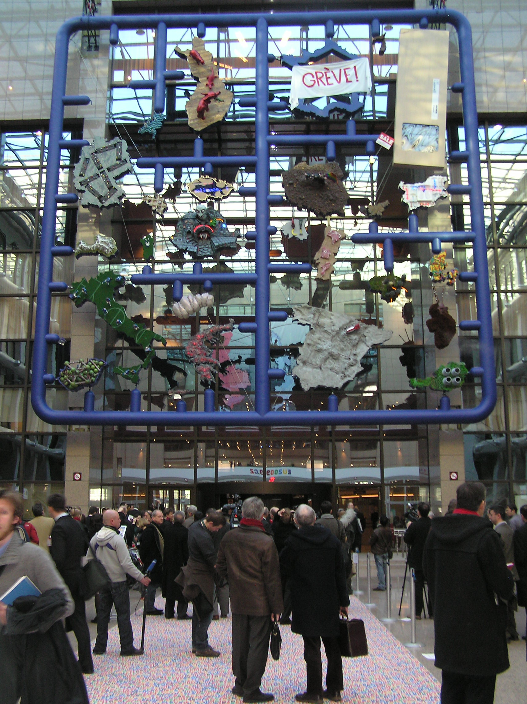 Skulptaĵo Entropa ekspoziciata en la konstruaĵo Justus Lipsius en Bruselo. Fotografaĵo farita de Marek Blahuš la 15-an de januaro 2009 post la inaŭgura gazetara konferenco